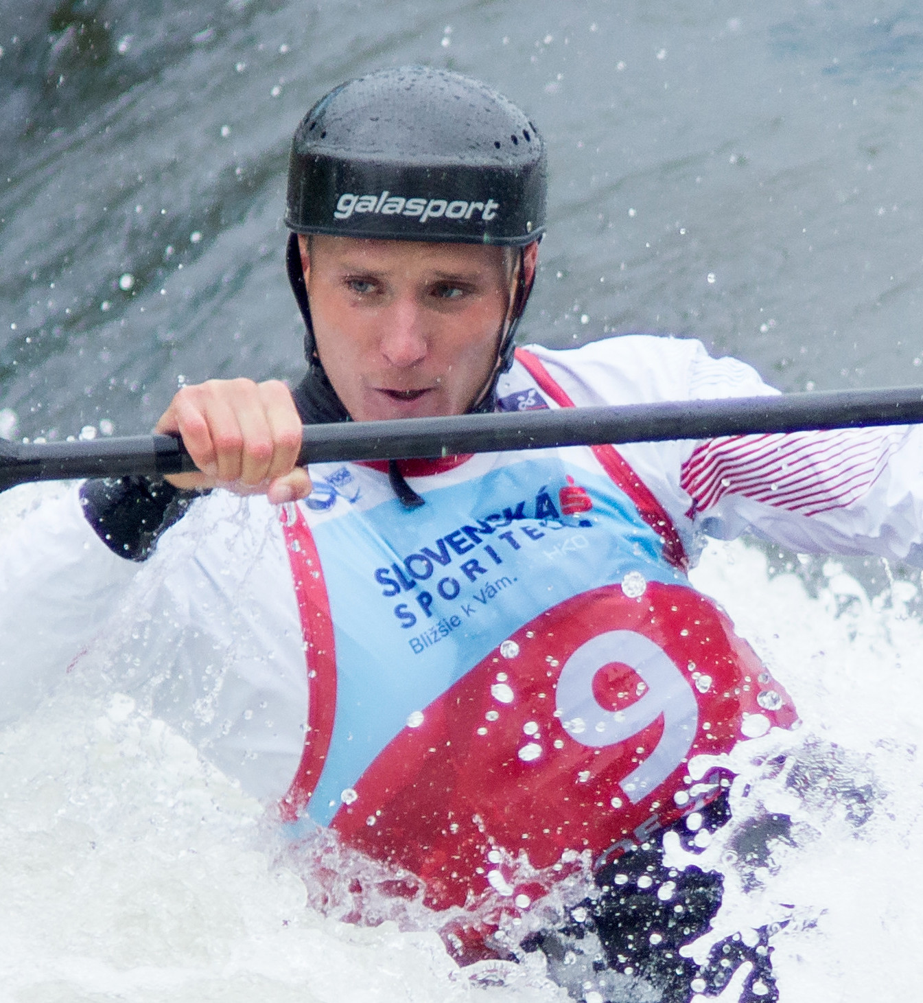 Vítek Přindiš